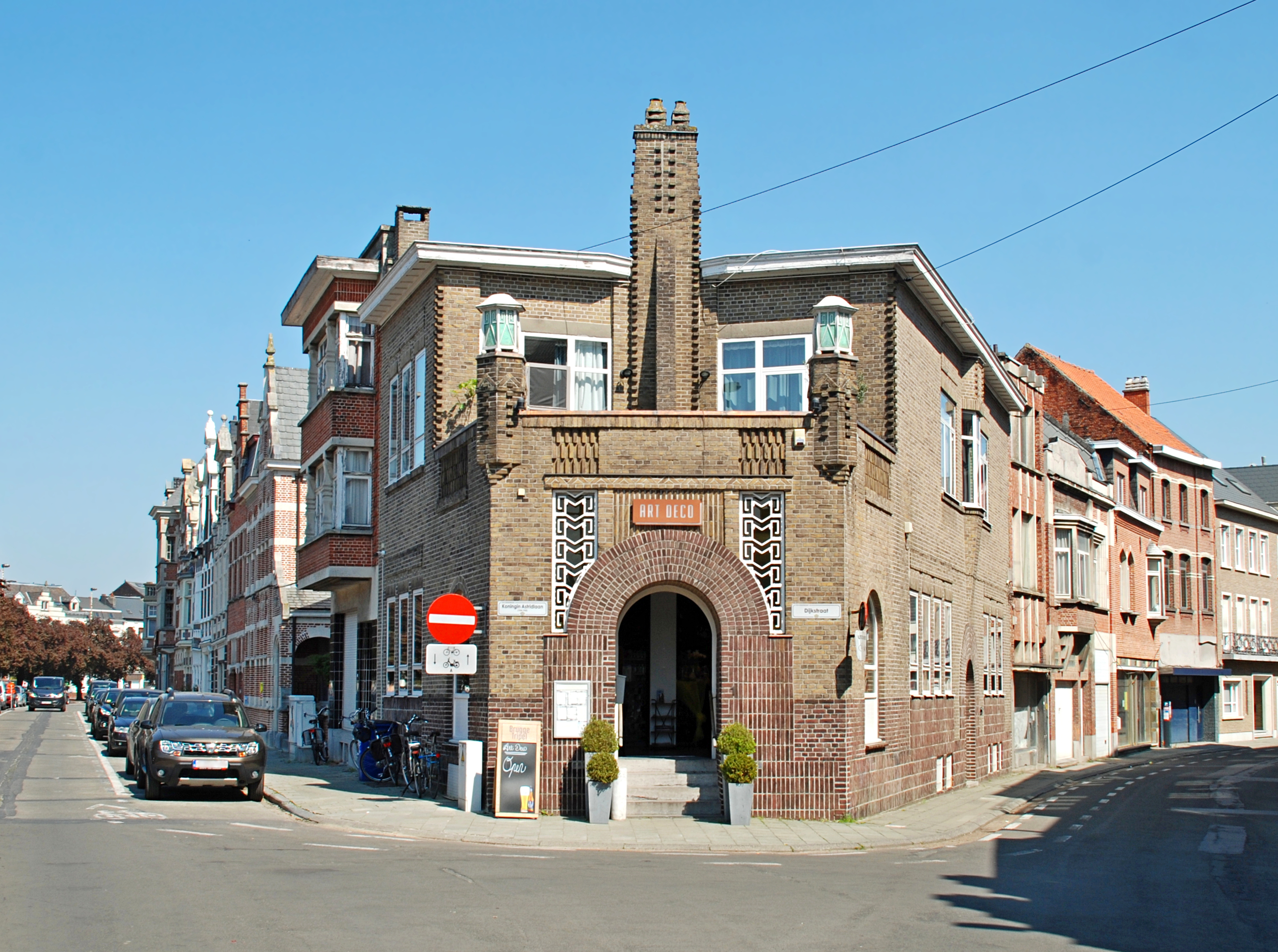 Belgique - Termonde - ancienne succursale de la Banque de Commerce de Gand (Gentse Handelsbank) - Art déco - architecte Jan-Albert De Bondt - 1926